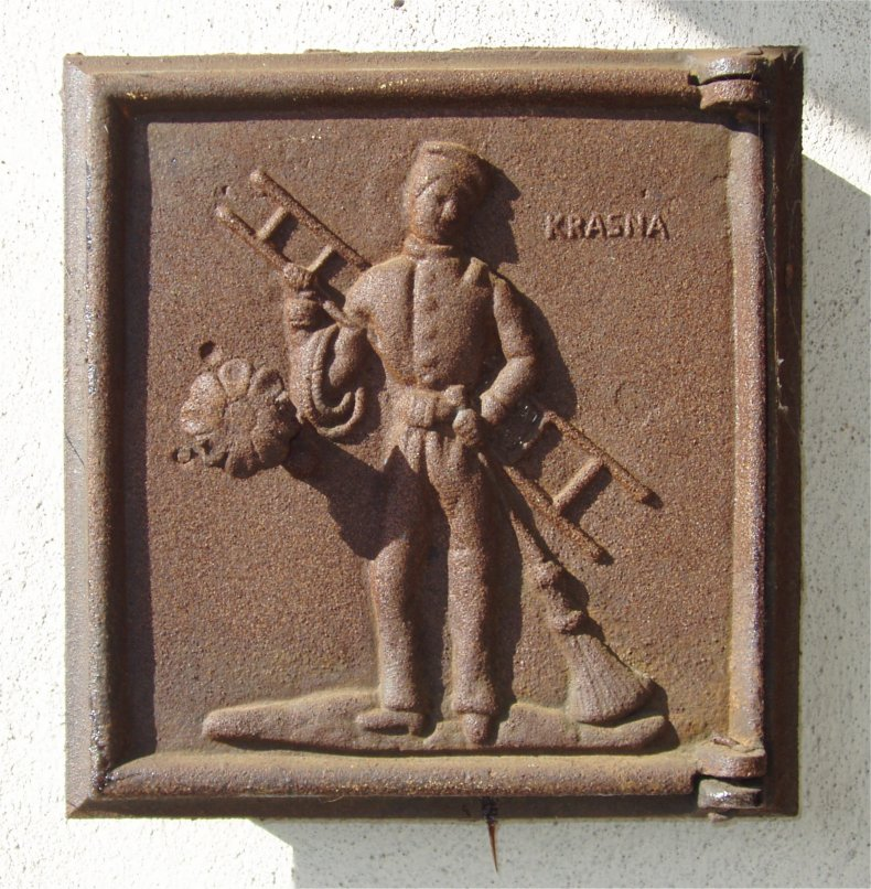 kominiarz